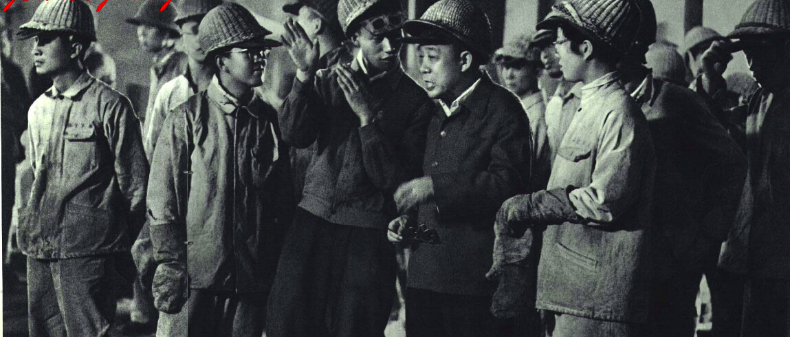 1966-04 1966年上海交通大学周志宏带队到上钢一厂